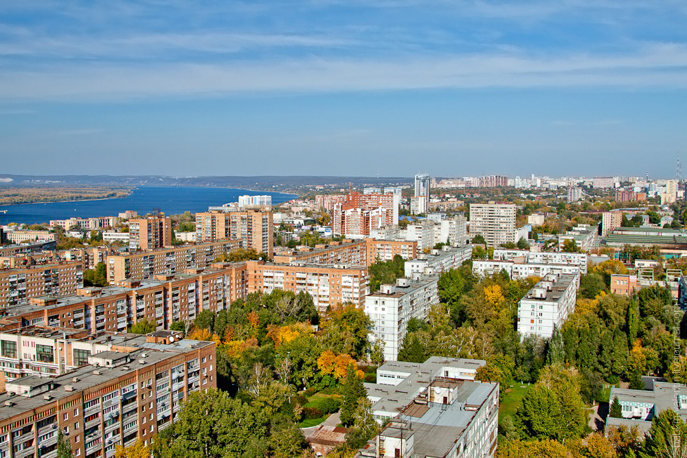 Oktyabrskiy rayon, Samara, Samarskaya oblast', Russia